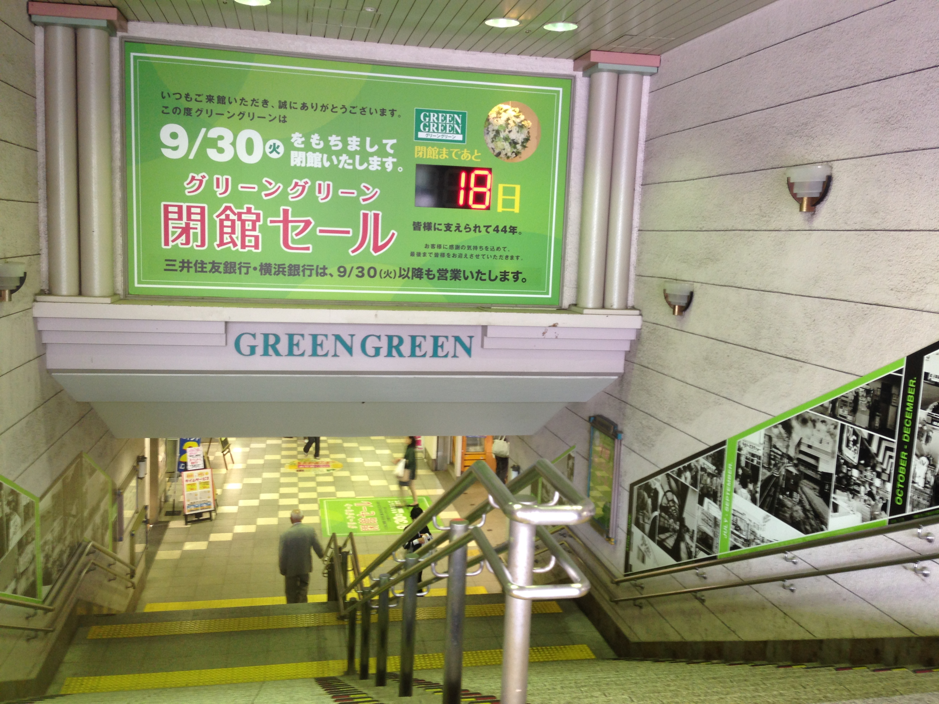 2014年9月30日で閉館する二俣川グリーングリーン（最後の月）。階段の頭上では閉館までの日数がカウントダウンされており、また階段の脇ではこれまでの歴史を振り返る写真も展示されている。